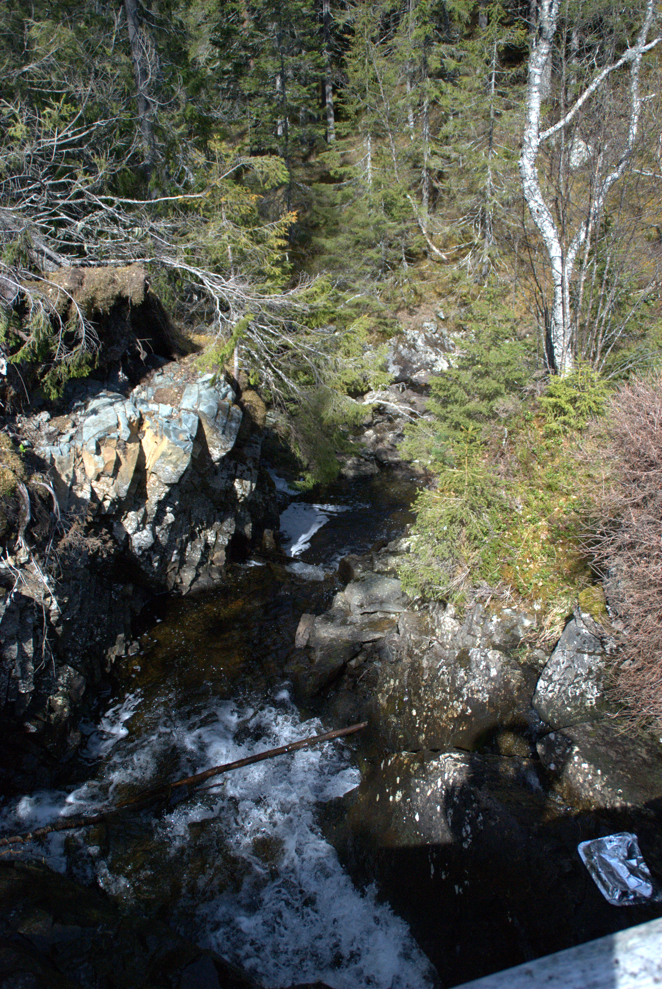 Trollabekken/Trollbekken rett nedenfor Nydammen retning Holstdammen i Bymarka i Trondheim.